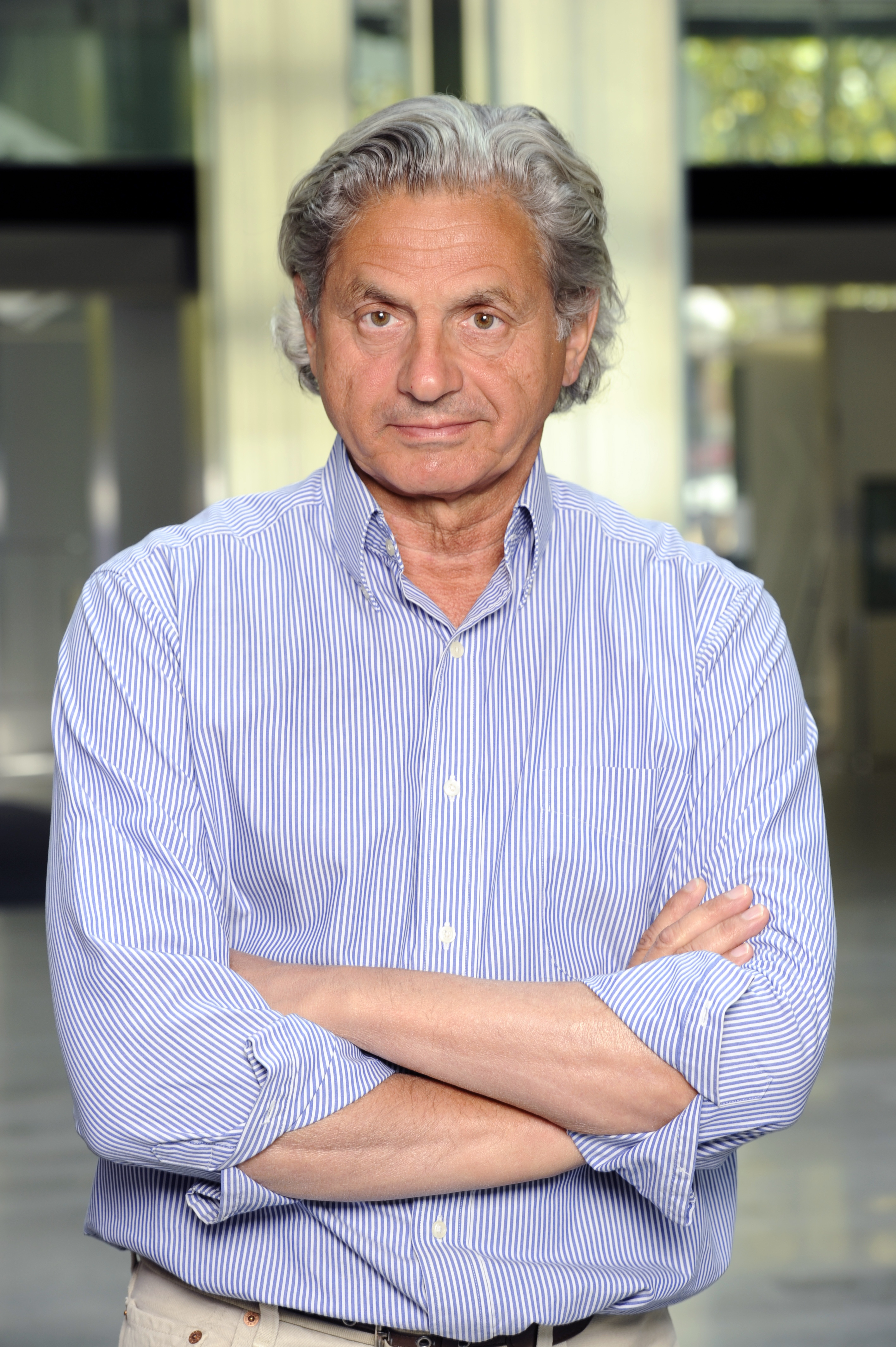 Alain Frachon, photo